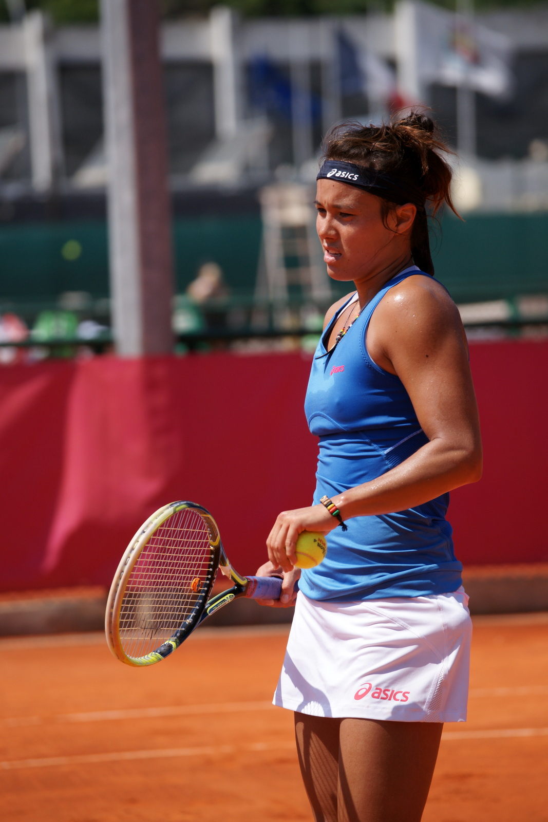 Laura Thorpe, Cagnes-sur-Mer 2013